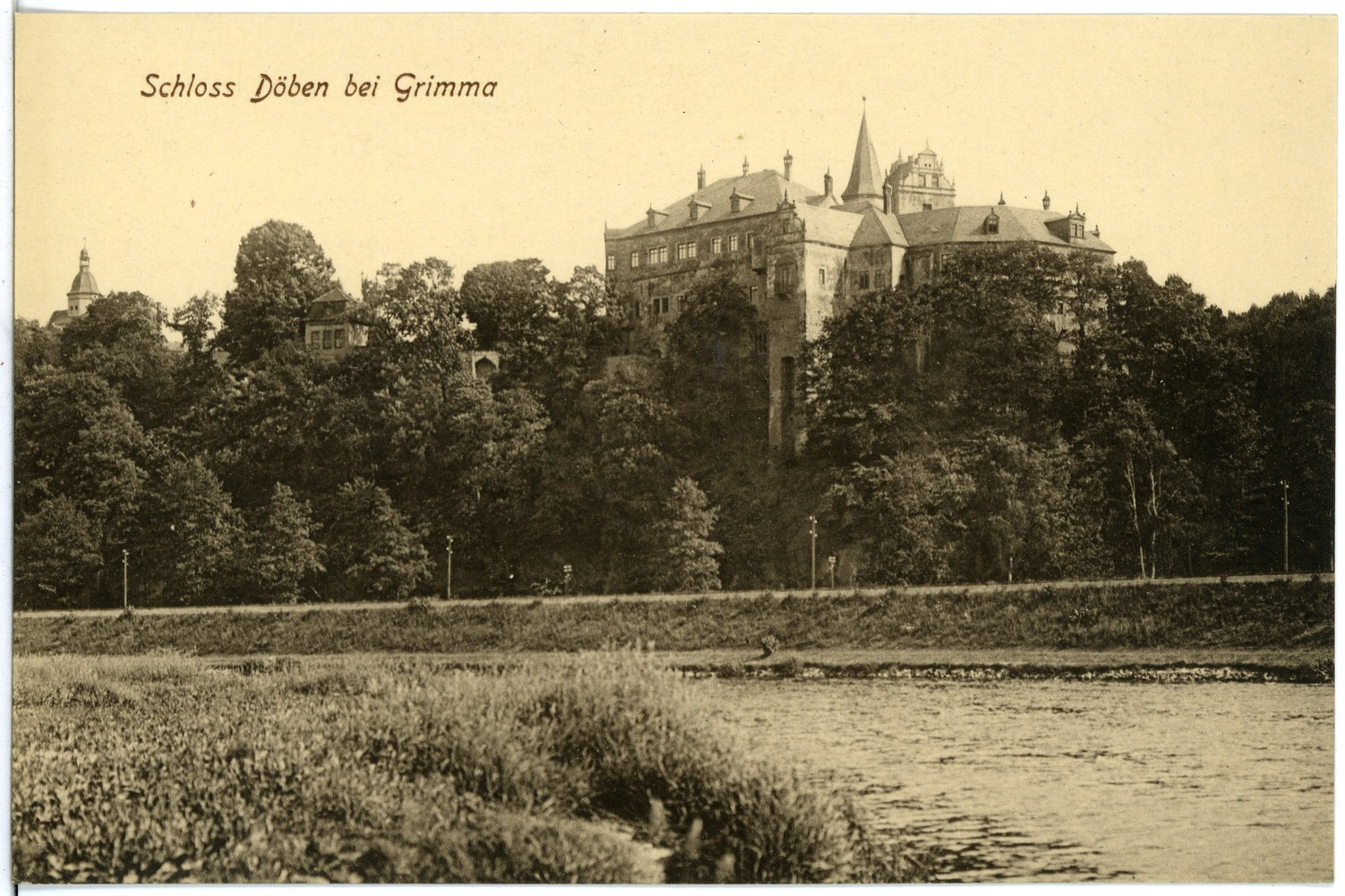 Grimma; Schloß Döben bei Grimma This postcard is from publisher Brück & Sohn in Meißen ( postcard has a unique number 19357 and is available in a higher resolution at the publisher. This images was uploaded in a cooperation project between Wikipedians and the publisher.